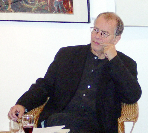 Bildbeschreibung: Der Schriftsteller Volker Braun während einer Ausstellungseröffnung in Berlin-Friedrichshagen, Oktober 2006. photo taken by User:SpreeTom (own work) date / Datum: 21.10.2006